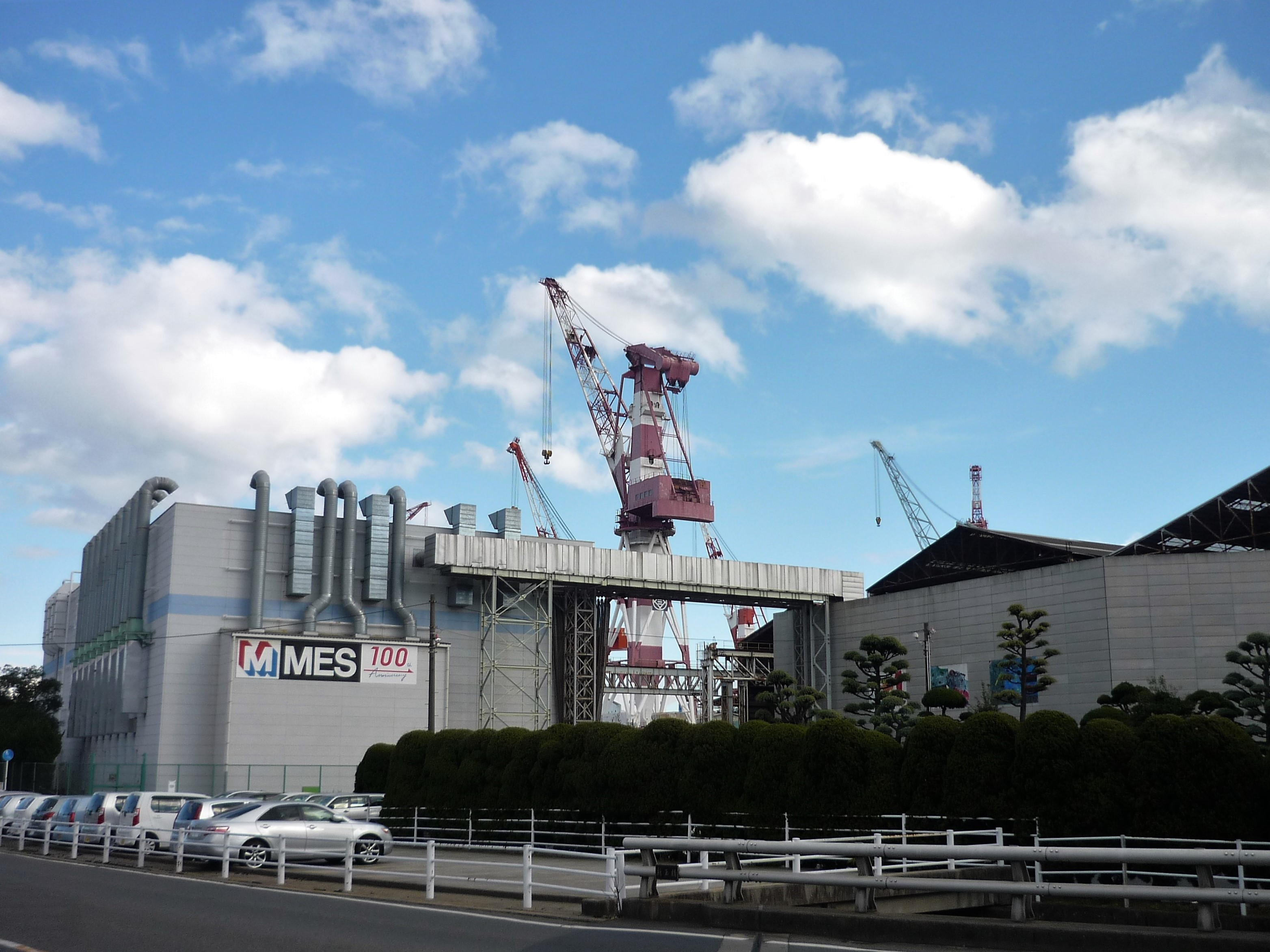 三井造船玉野事業所